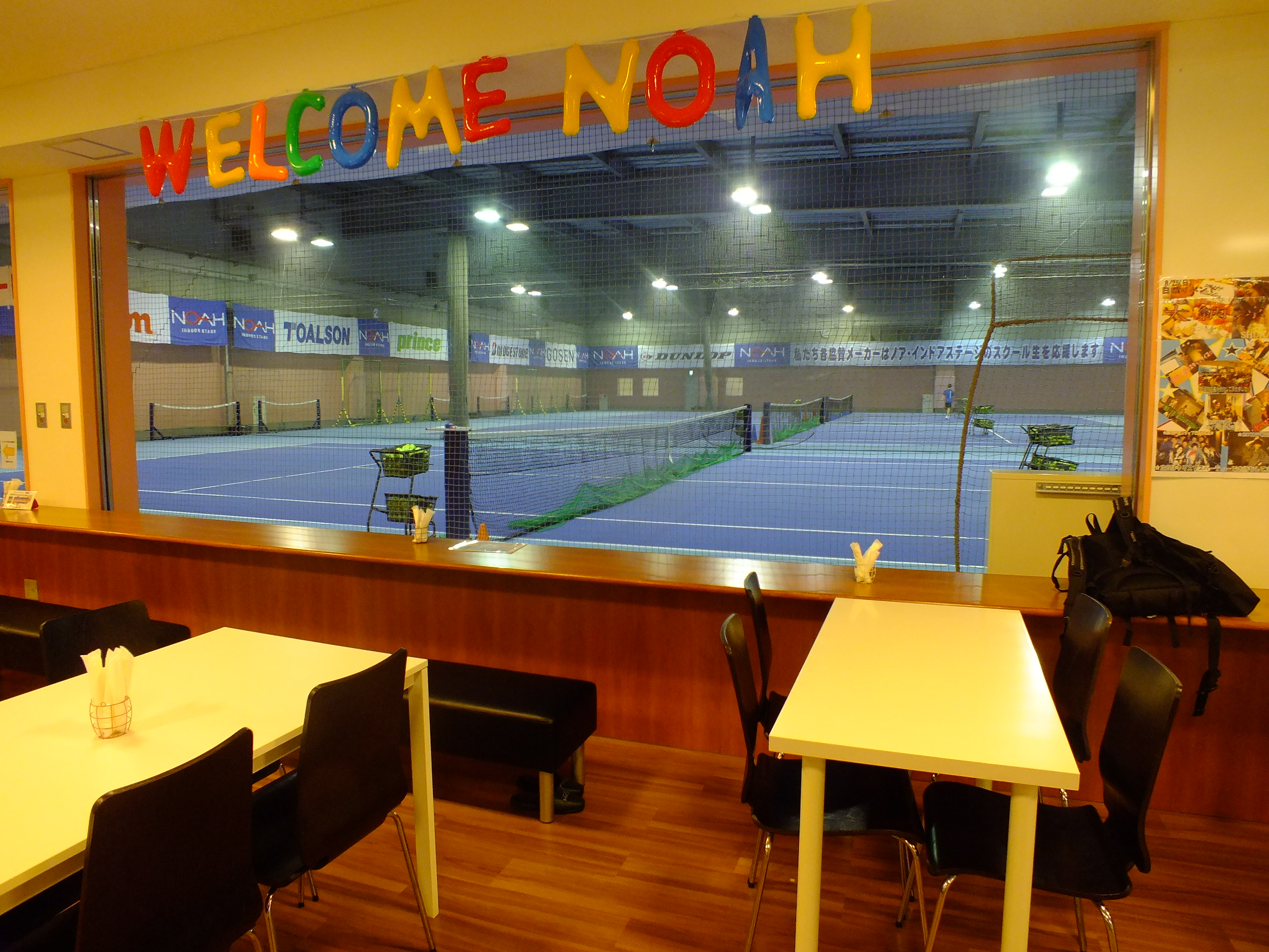 Noah Indoor Stage HAT Kobe テニススクール・ノア HAT神戸校 〒651-0073 兵庫県神戸市中央区脇浜海岸通2-2-3